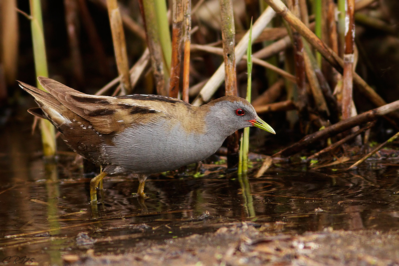 schiribilla(porzana-parva)